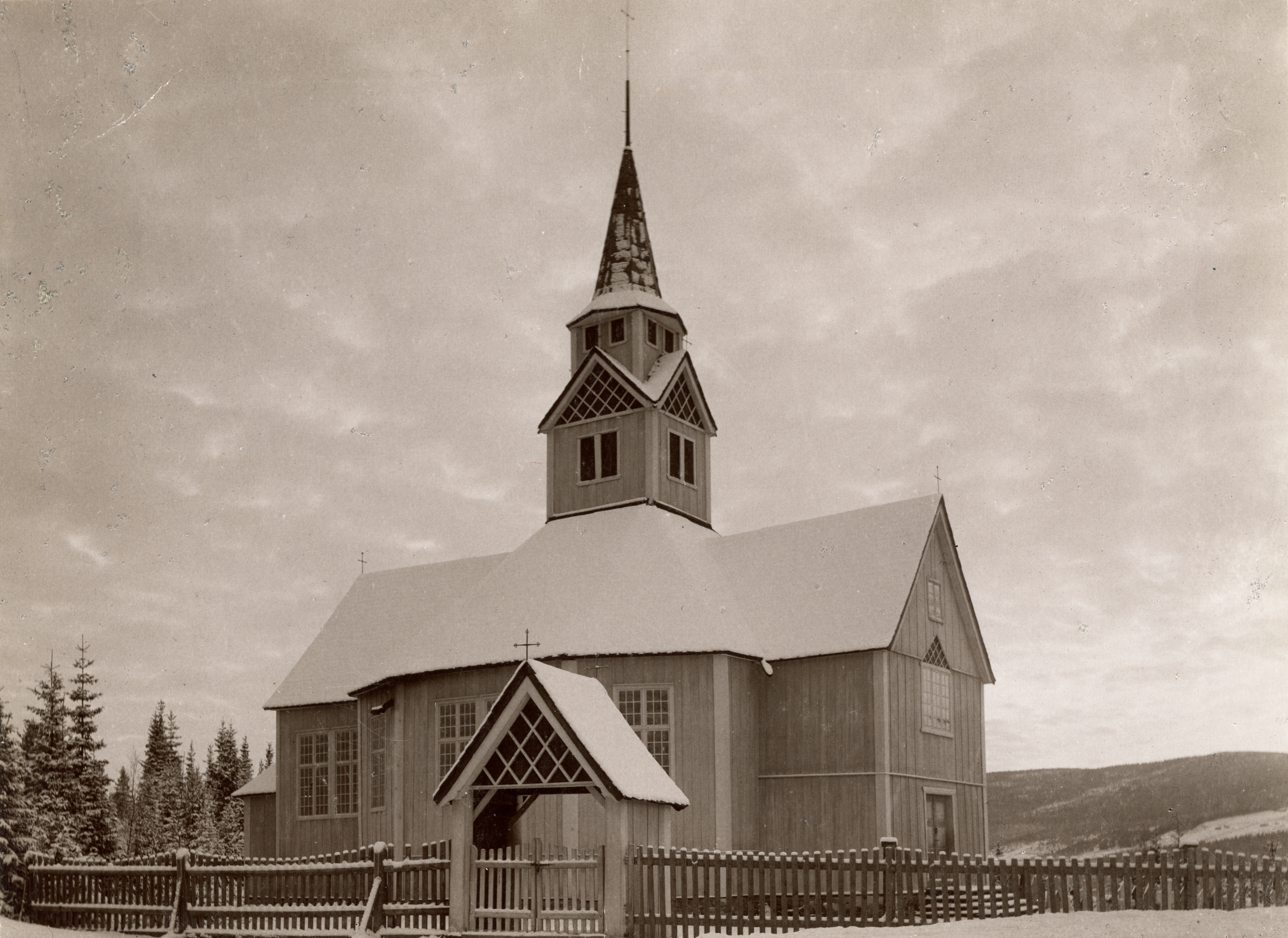 Rogne kirke i Rogne, Oppland